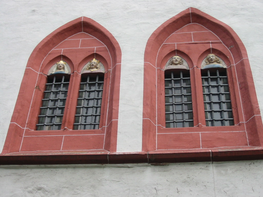 Fenster mit Königspaar und Bürgerpaar am Holzturm, Mainz